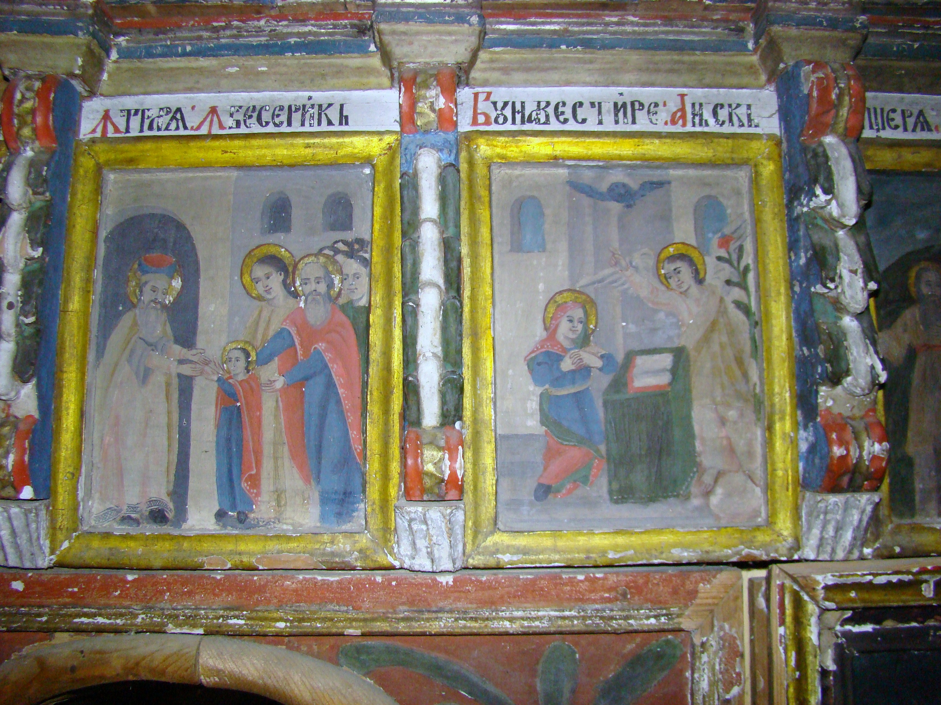 Biserica de lemn "Adormirea Maicii Domnului" a fostei mănăstiri "Izvoru Negru" , sat MOISEI 01